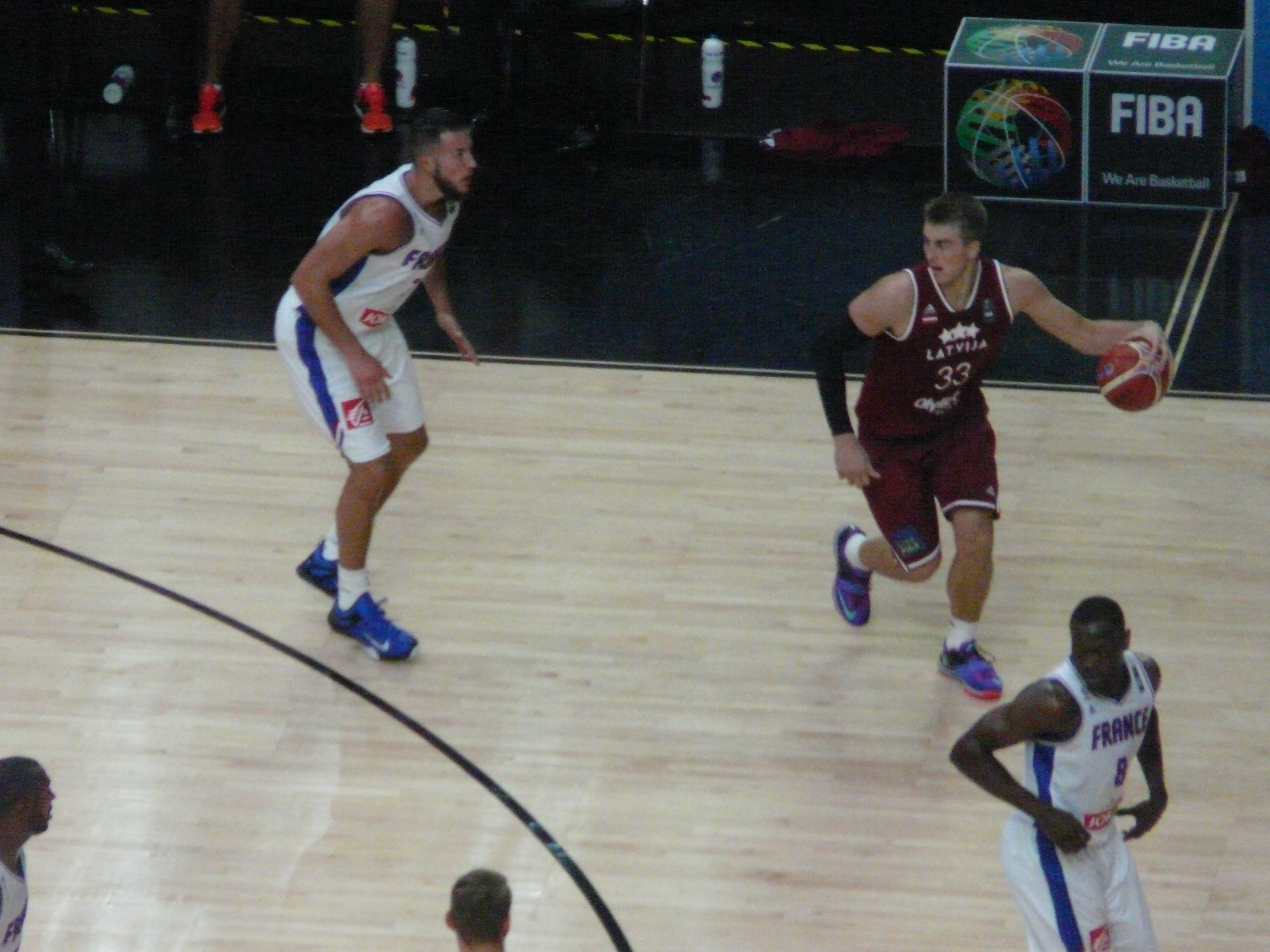 Mārtiņš Meiers (#33) au dribble lors du quart de finale de l'EuroBasket 2015 entre la France et la Lettonie, le 15 septembre 2015.